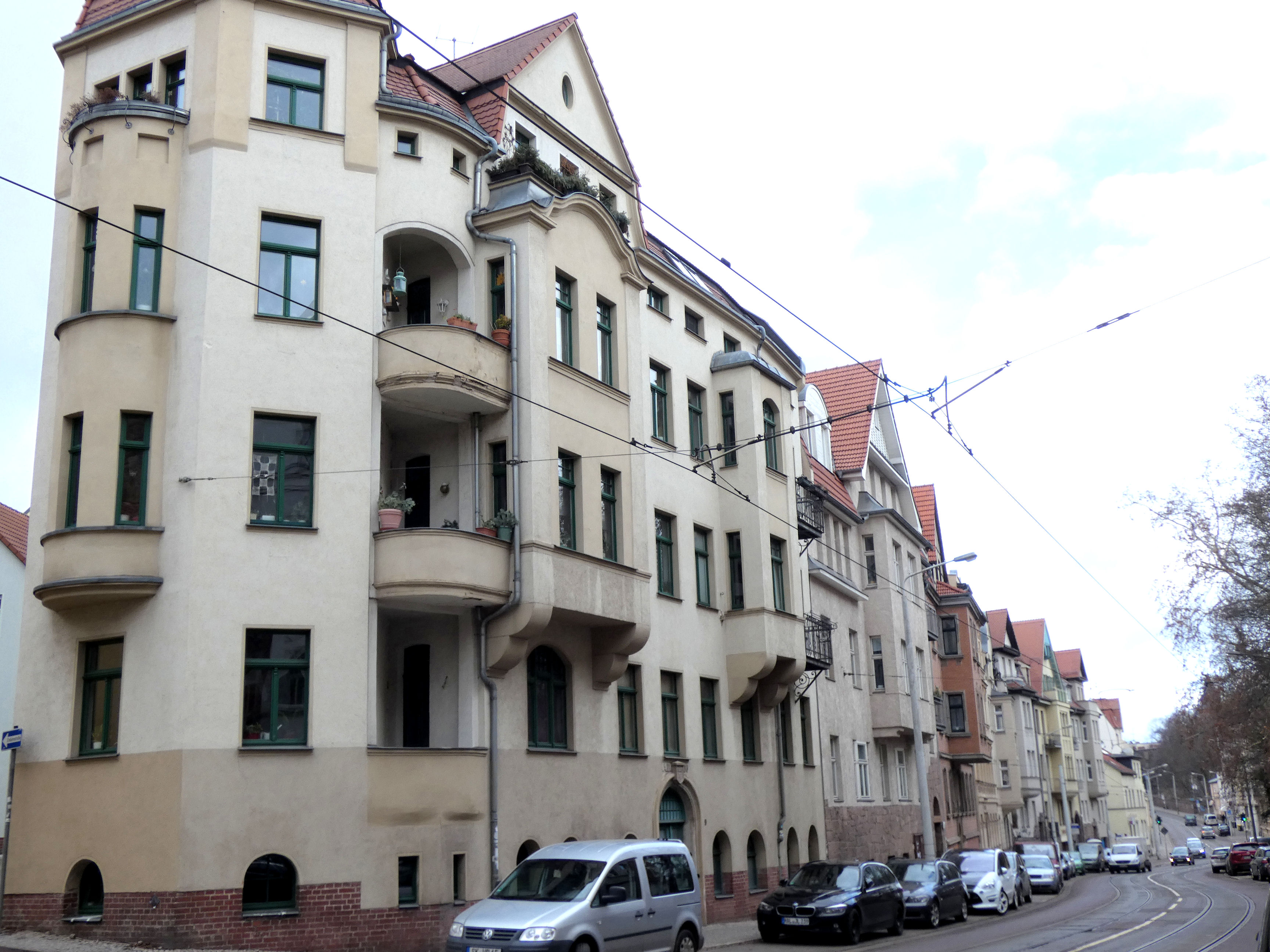 Seebener Straße Nr. 9-16, Halle (Saale)